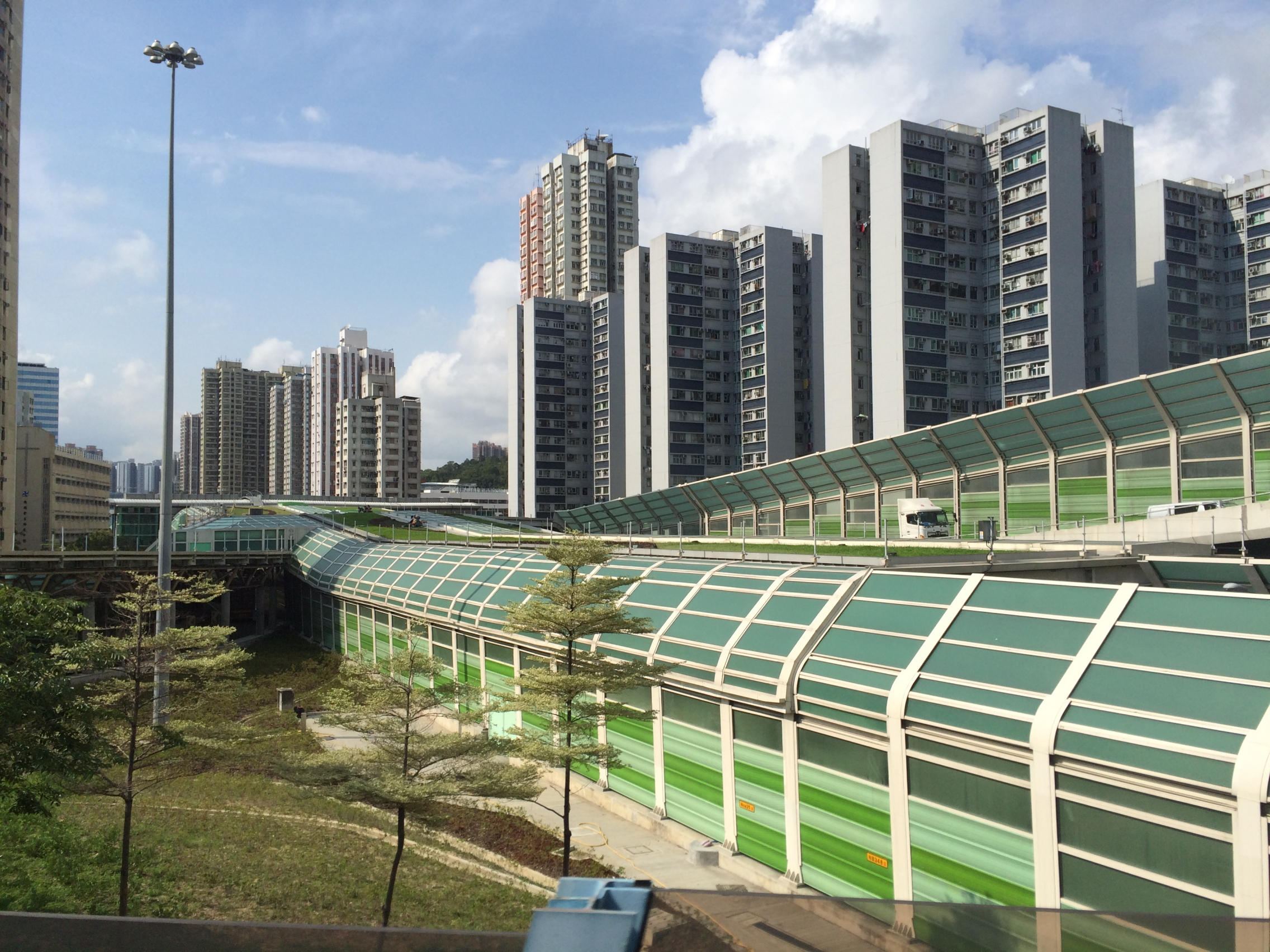 Tuen Mun Road